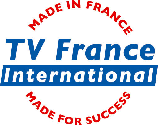 Logo TV France International version anglaise